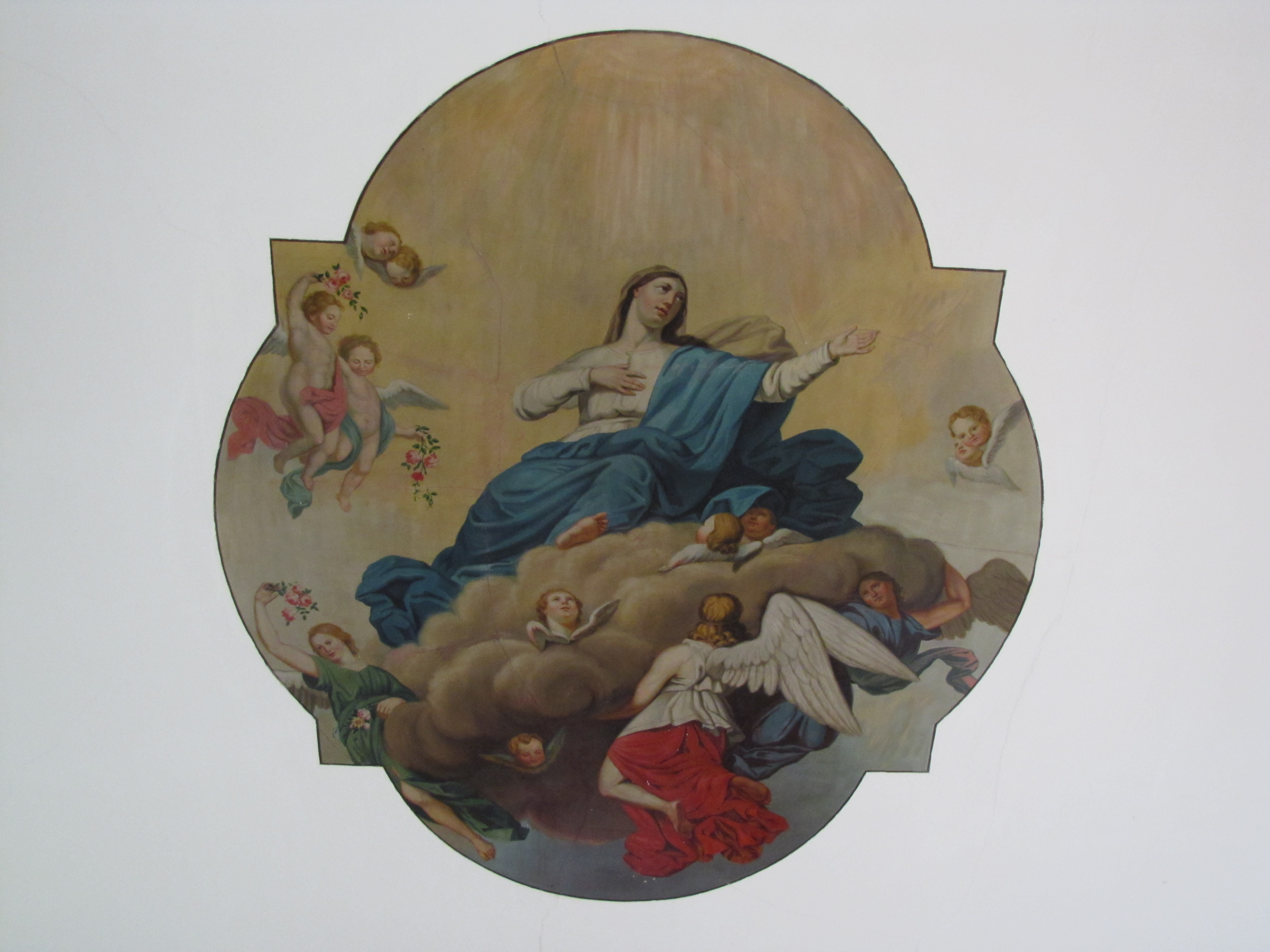 Alsace, Bas-Rhin, Plobsheim, Chapelle Notre-Dame du Chêne, Appartement du Waldbruder (1812): (PA00084895, IA00023121): Peinture monumentale du plafond.